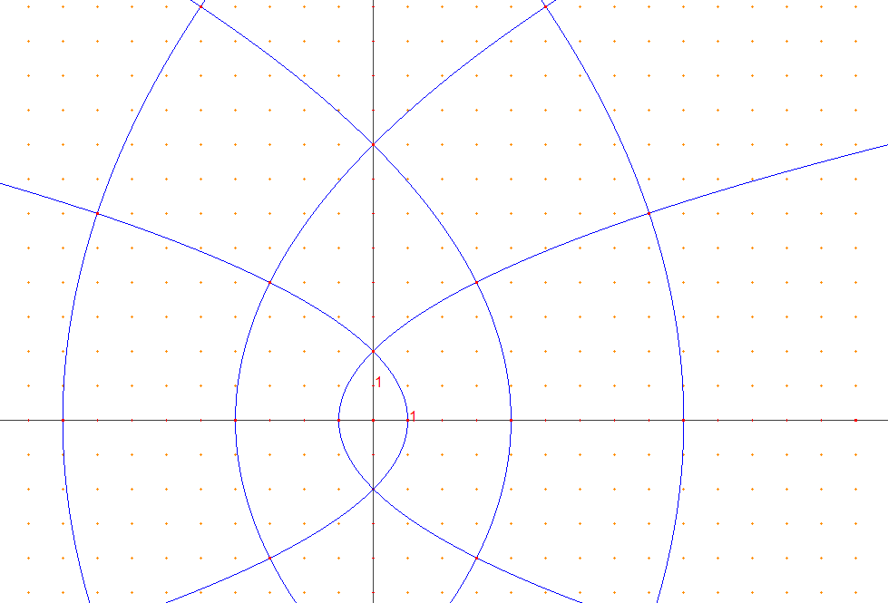 créé sous CABRIgéomère